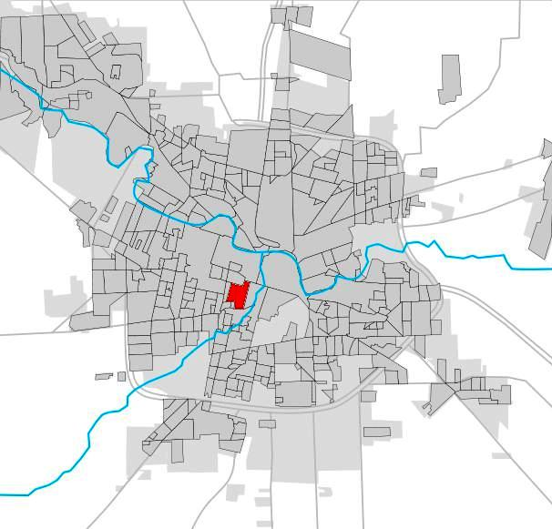 Ubicación del barrio dentro de Córdoba